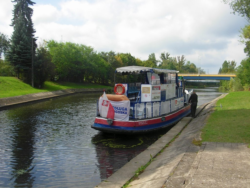 Bydgoski Tramwaj Wodny w śluzie Okole na Kanale Bydgoskim